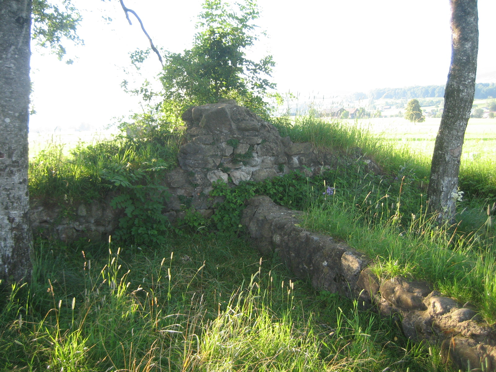 Bibiton Innenmauer